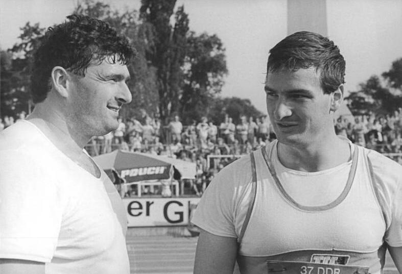 Udo Beyer, Ulf Timmermann ADN-ZB Kasper 27.6.86 Bez. Gera: 37. DDR-Meisterschaften der Leichtathleten in Jena - Für einen Höhepunkt am ersten Tag der Titelkämpfe auf dem Jenaer Ernst-Abbe-Sportfeld sorgten die Kugelstoßer mit 22-m-Weiten; DDR-Meister wurde Udo Beyer (ASK Potsdam, l.) mit 22,14 m vor Ulf Timmermann (TSC Berlin) mit 22,00 m.